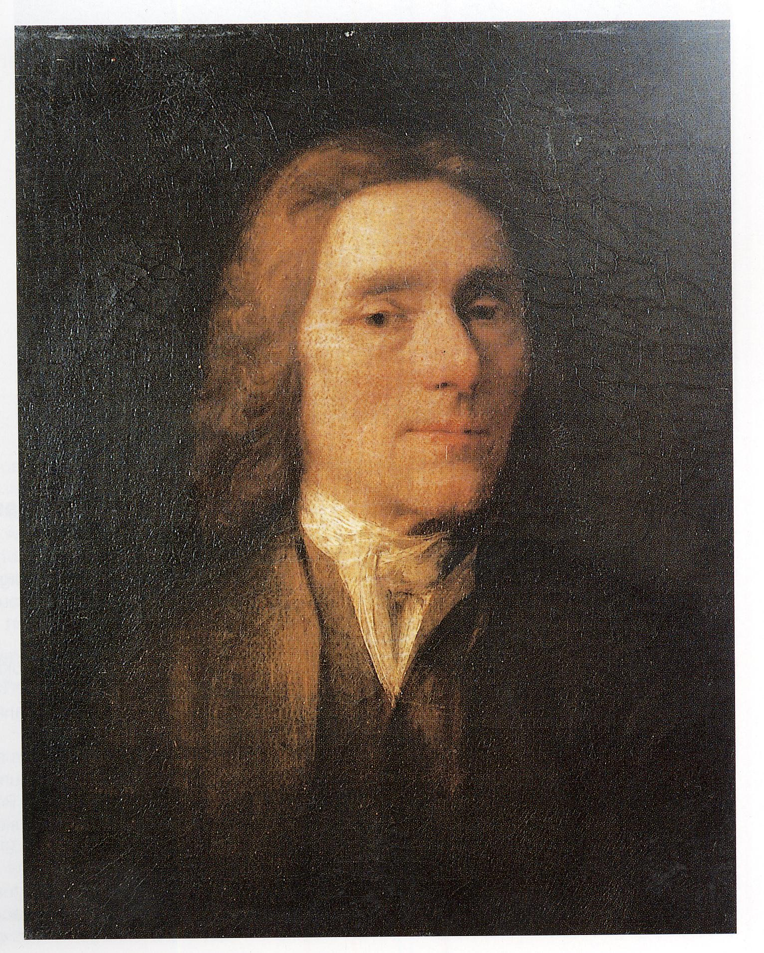 Porträt Georg Sebastian Urlaub um 1737, Öl auf Leinwand, doubliert, Georg Anton Urlaub. Beschriftung: "Sebastian Urlaub/16../G. Anton Urlaub", heute Mainfränkisches Museum Würzburg